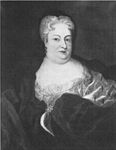 Sophie Amalie von Ahlefeldt (* 12. Juni 1675 in Kopenhagen; † 24. Februar 1741 in der Schlosskirche in Sønderburg.)